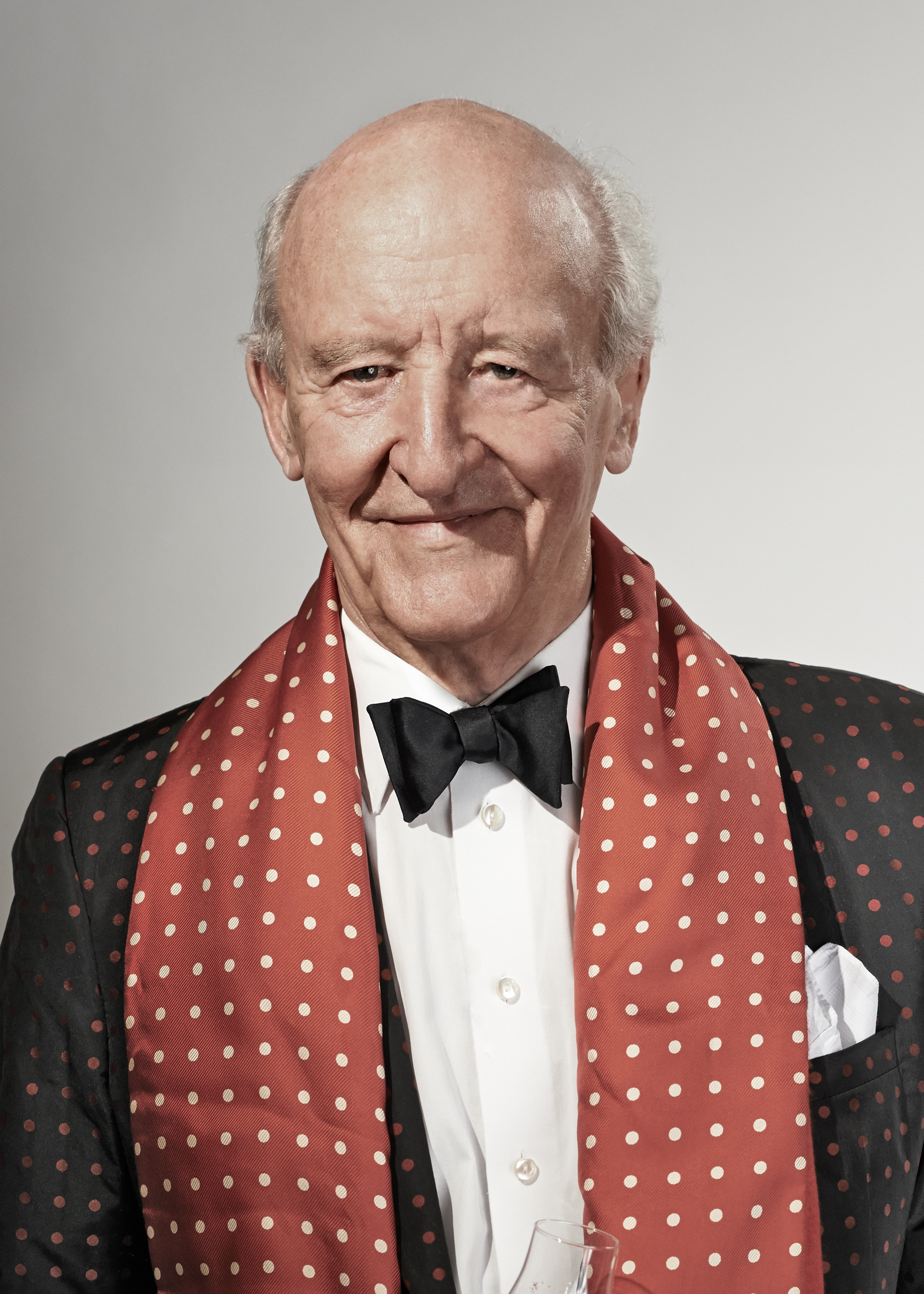 Politikern och företagsledaren Ian Wachtmeister.